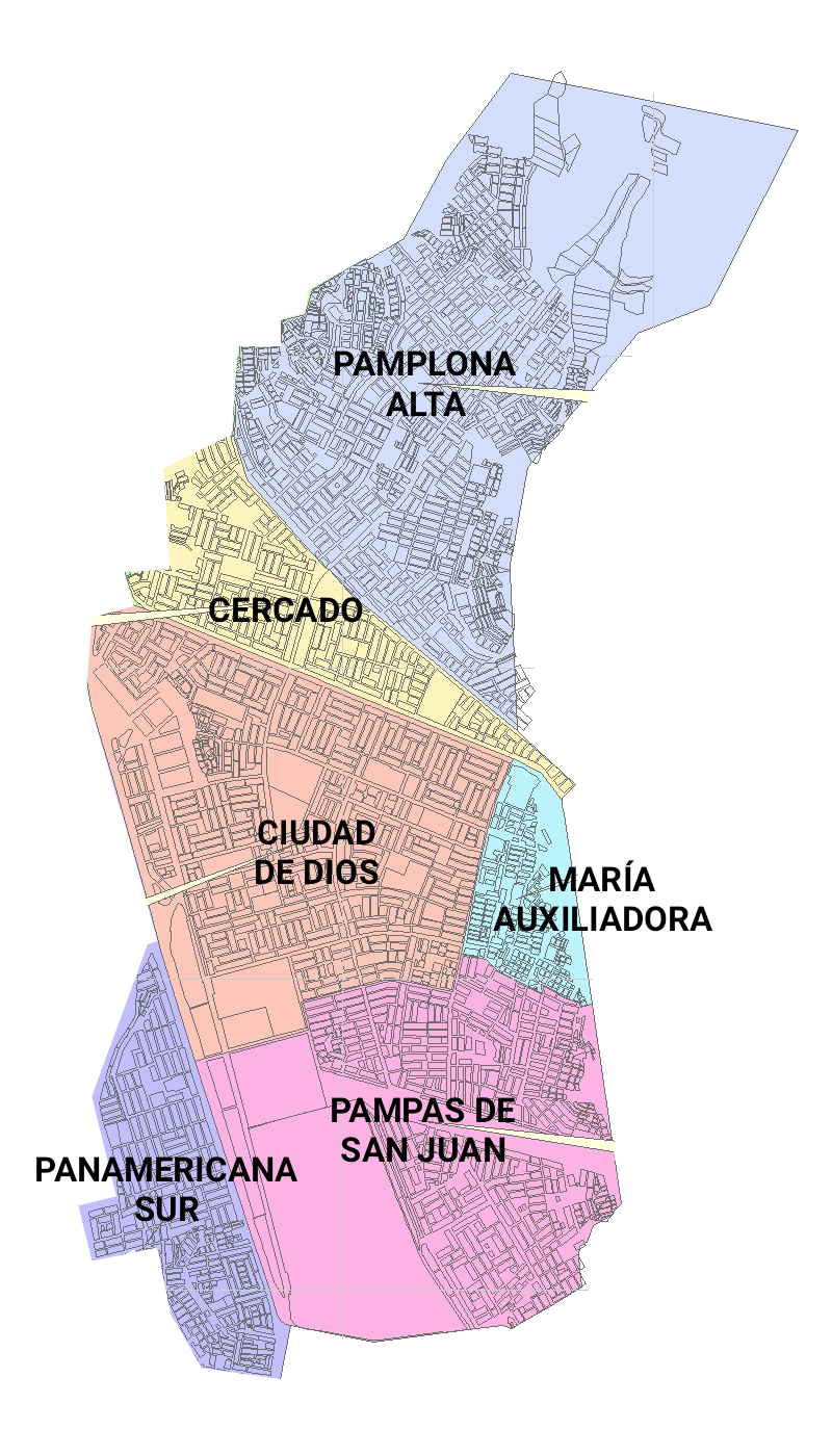 El distrito de San Juan de Miraflores es uno de los 43 distritos que conforman la provincia de Lima Metropolitana. [ver más]